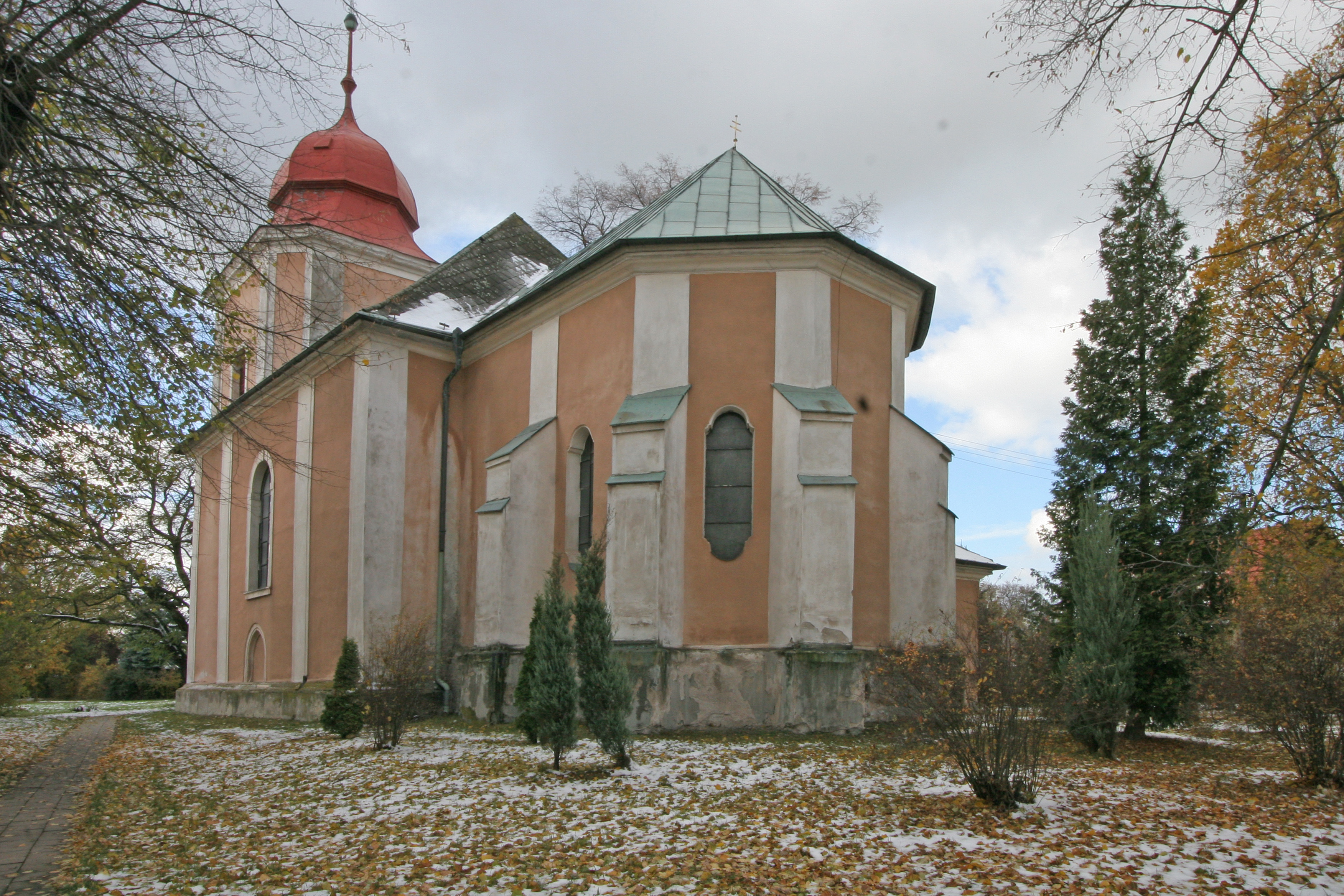 Kostel sv. Petra a Pavla (Rohovládova Bělá), Rohovládova Bělá